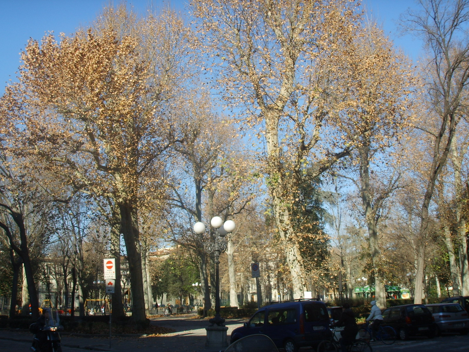 Piazza d'azeglio in Florence, Italy